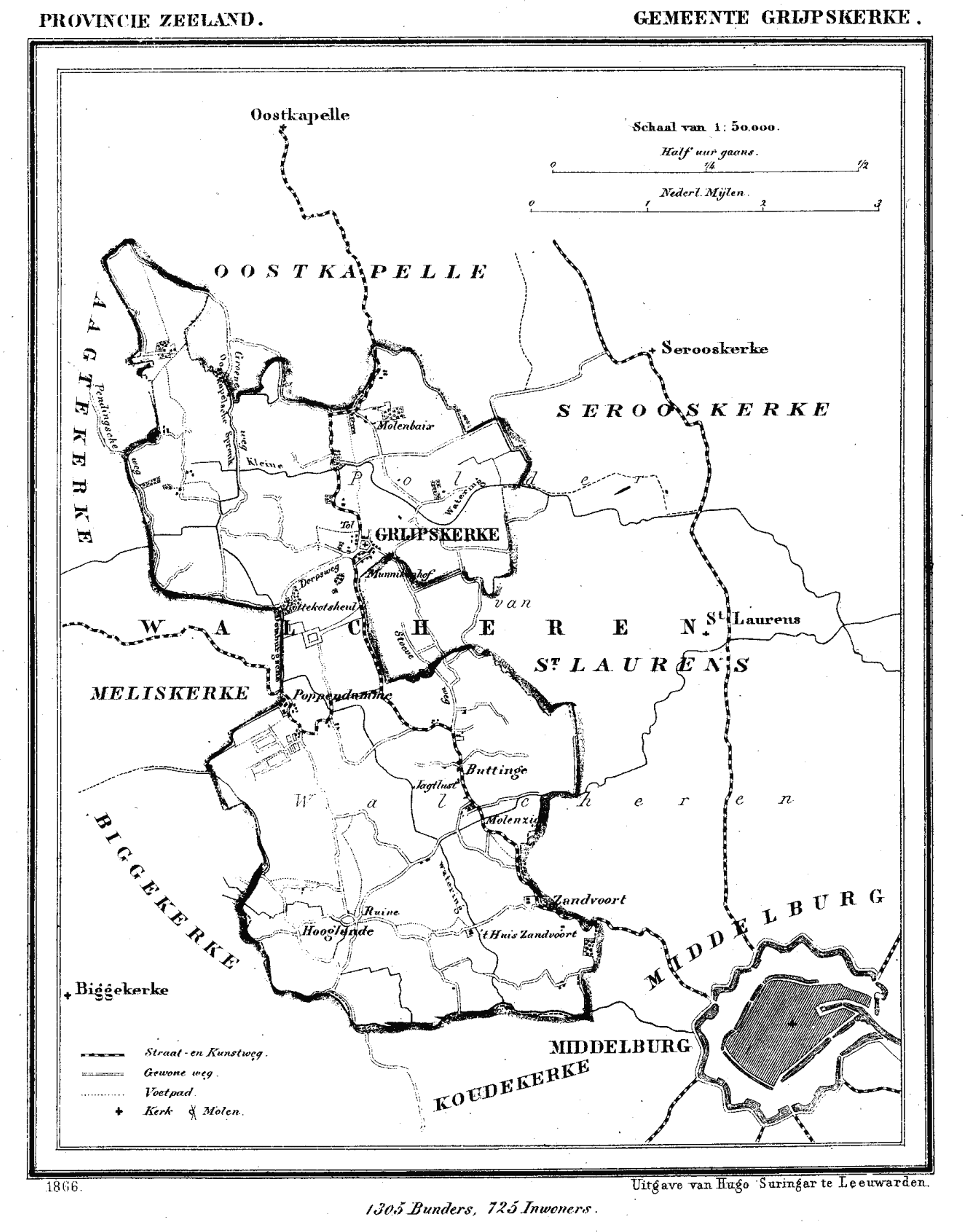 Gemeente Grijpskerke, Zeeland, Nederland